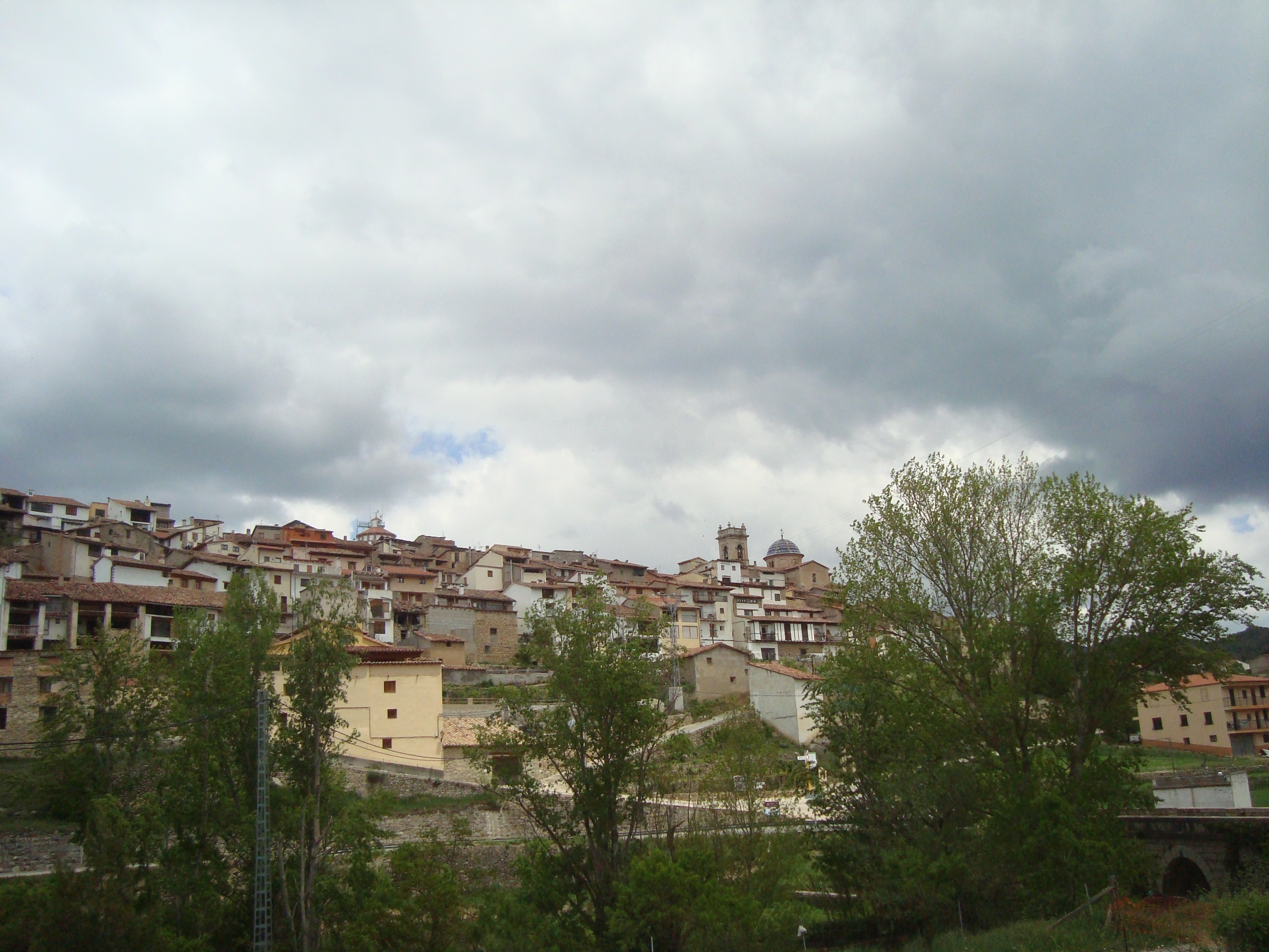 Panorámica de Sorita